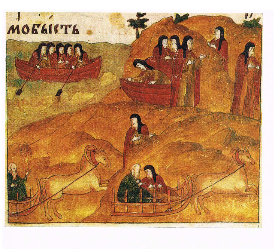 Рукопись «Житие Зосимы и Савватия» (XVII век). Ладья и сани.